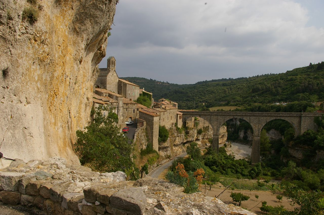 Pont sur la Cesse et village de Minerve (Département Hérault)